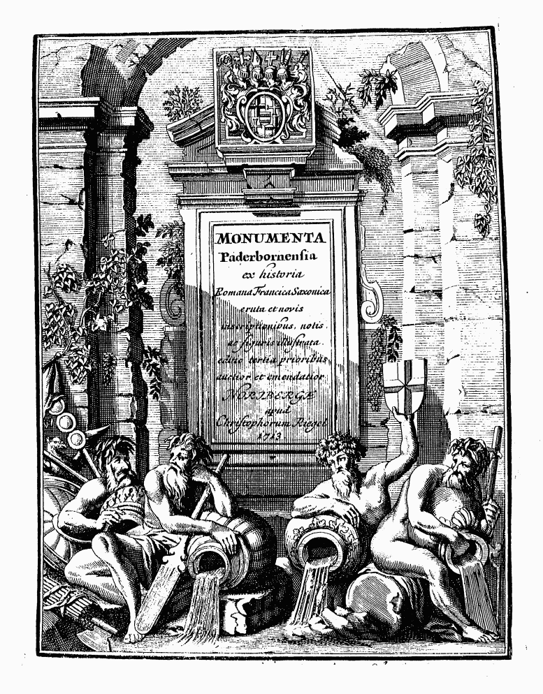 Monumenta Paderbornensia, Ausgabe 1713